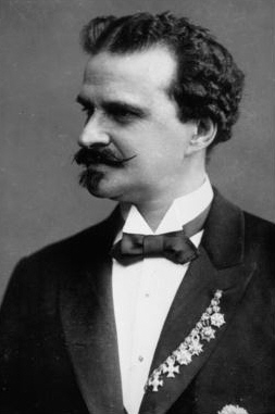 EduardStrauss